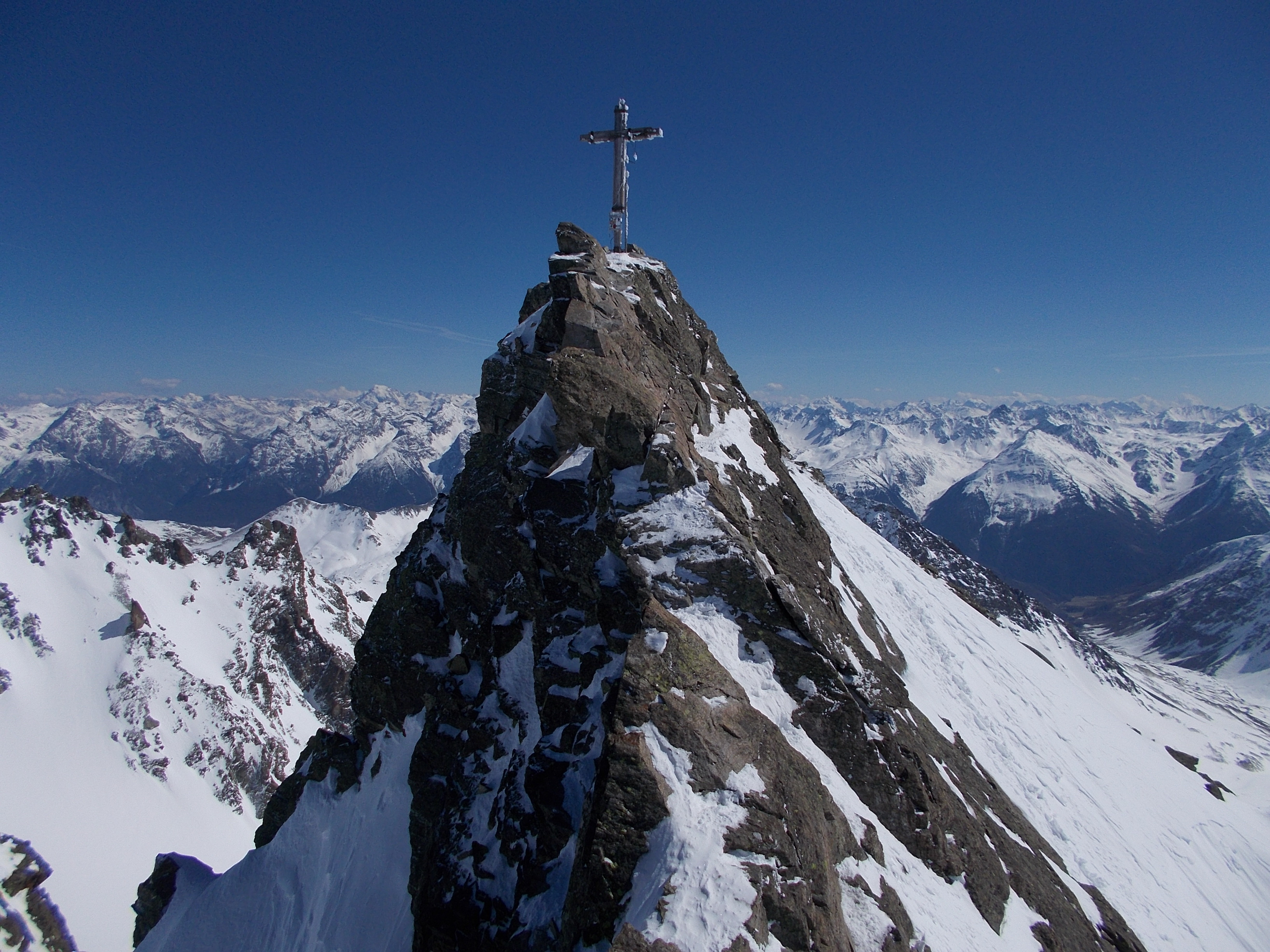 Hauptgipfel (3197 m) vom Vorgipfel, Ortler links, Cima di Piazzi rechts dahinter